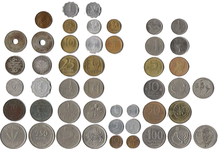 מרבית המטבעות הישראלים